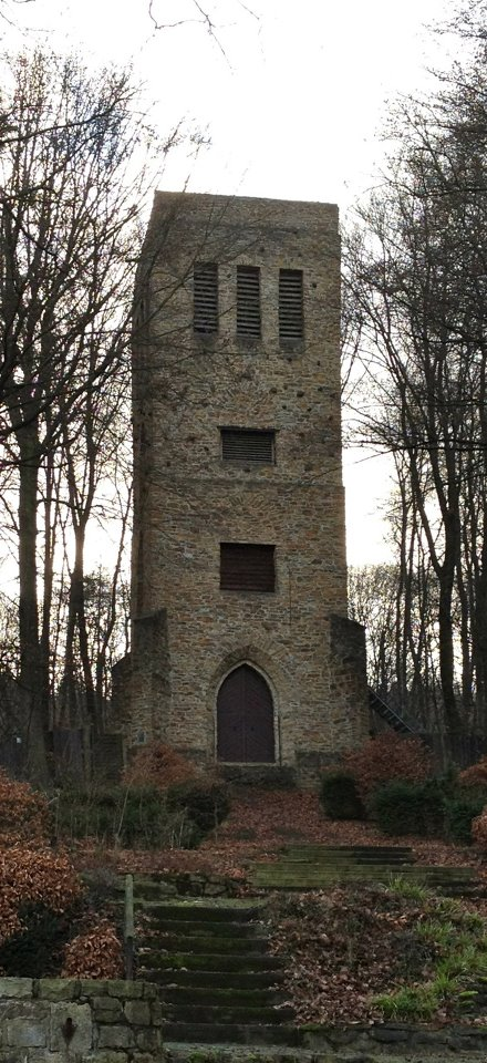 Glockenturm auf dem Hünenbrink, das Wahrzeichen der Freilichtbühne Nettelstedt This image shows a heritage building in Germany, located in the North Rhine-Westphalian city Lübbecke (no. 31).